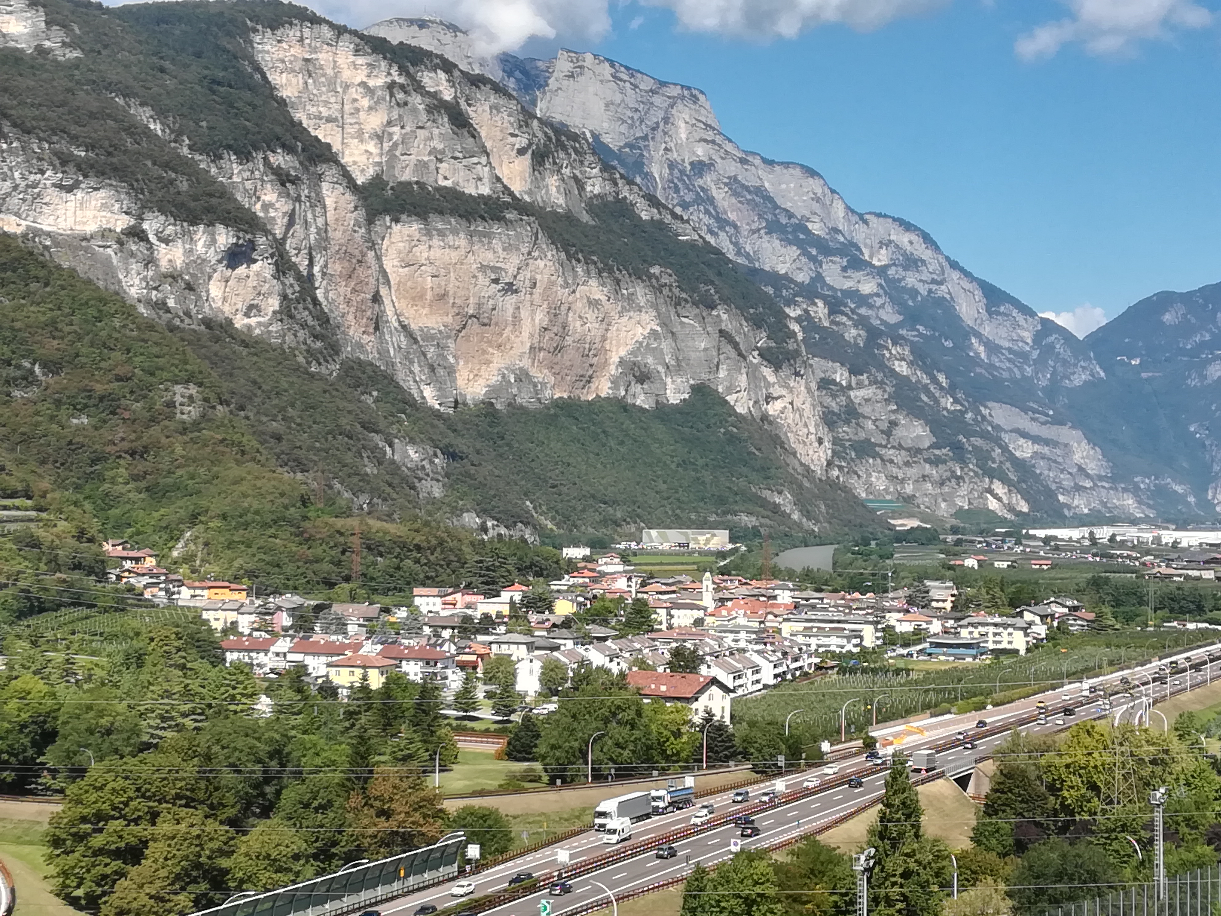 Panorama di Vela dal Doss Trento, 2018